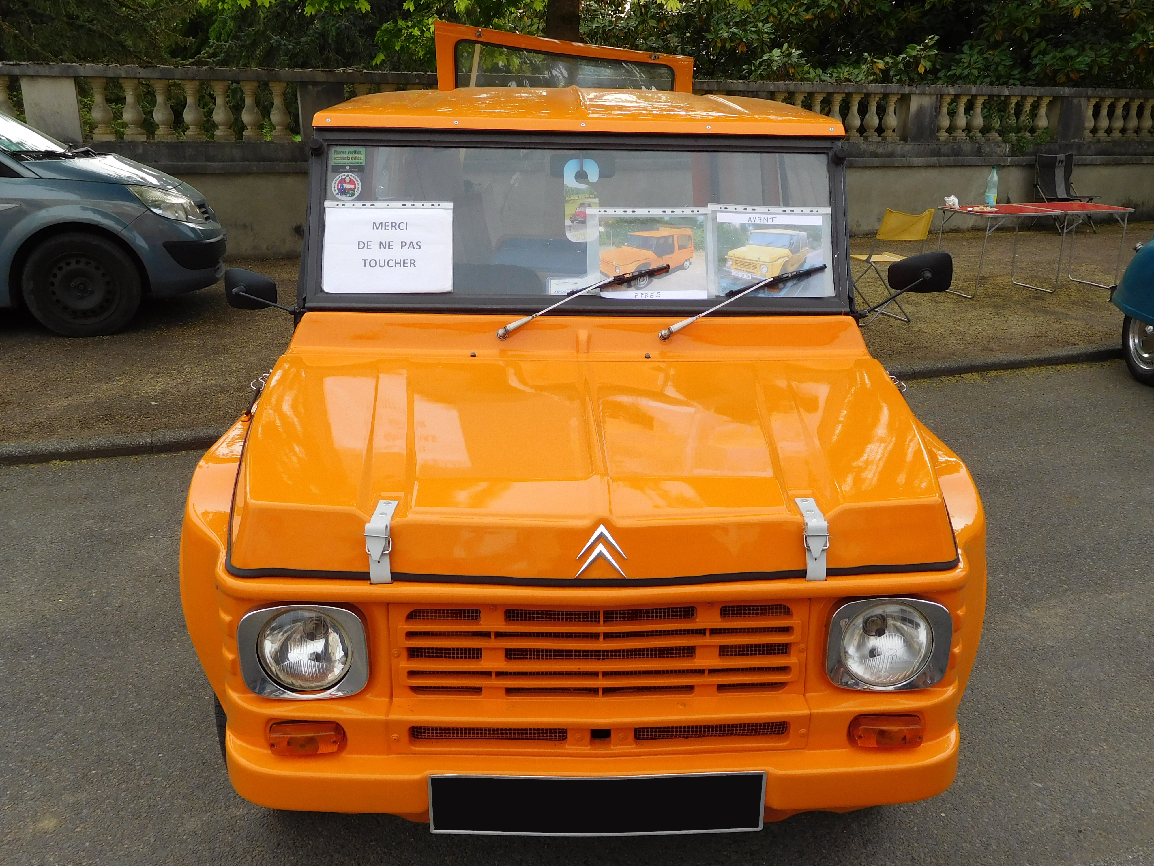 Citroën Méhari orange.